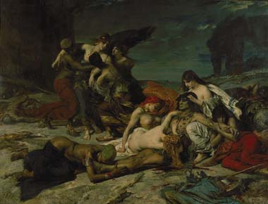 "Mort de Ravana" ("Death of Ravana"), Musée des Augustins, Toulouse, France